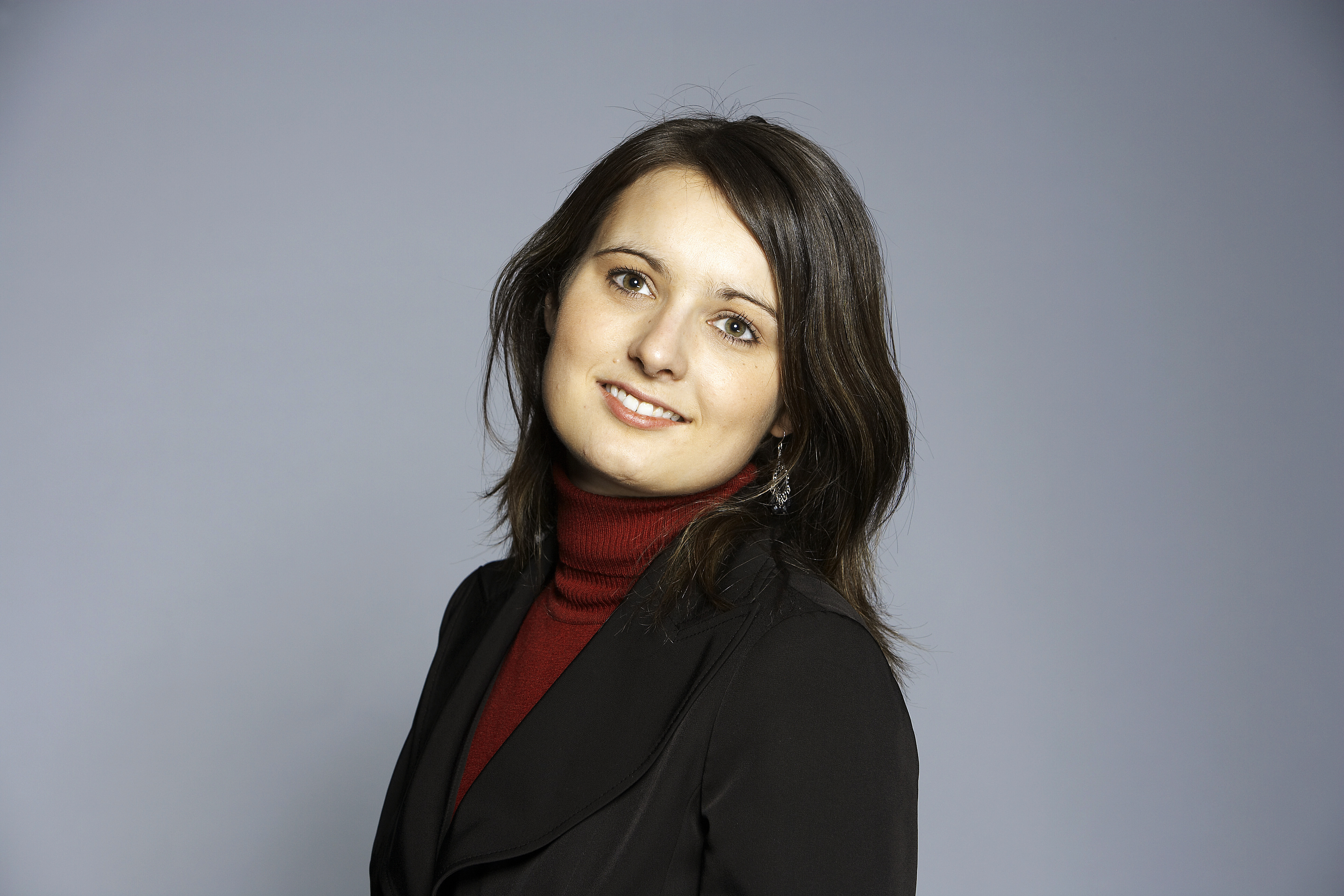 Hanne Maren Blåfjelldal, FrP-politiker